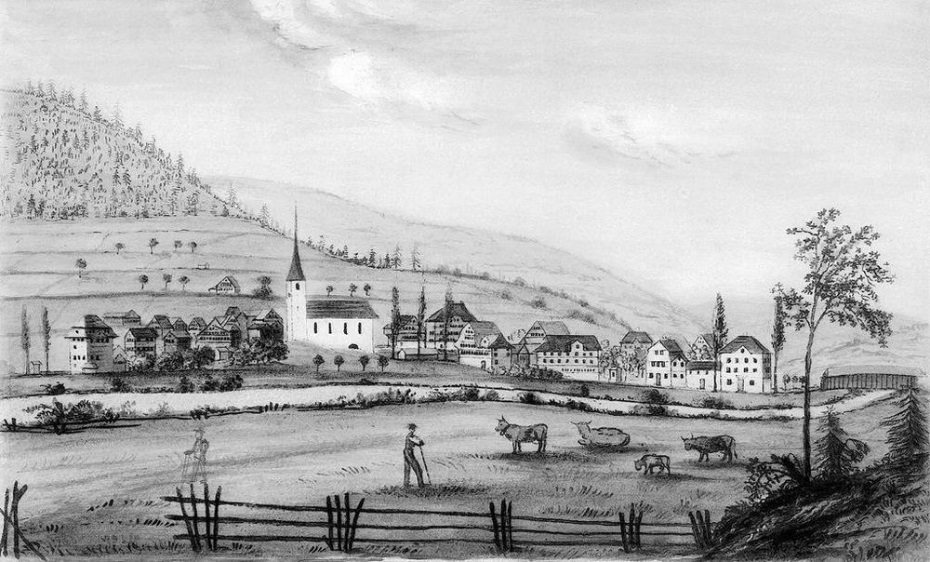 Dorfansicht von Brunnadern. Vom rechten Neckerufer aus ist die Kirche von 1763 erkennbar. Kolorierte Radierung circa 1830 date QS:P,+1830-00-00T00:00:00Z/9,P1480,Q5727902